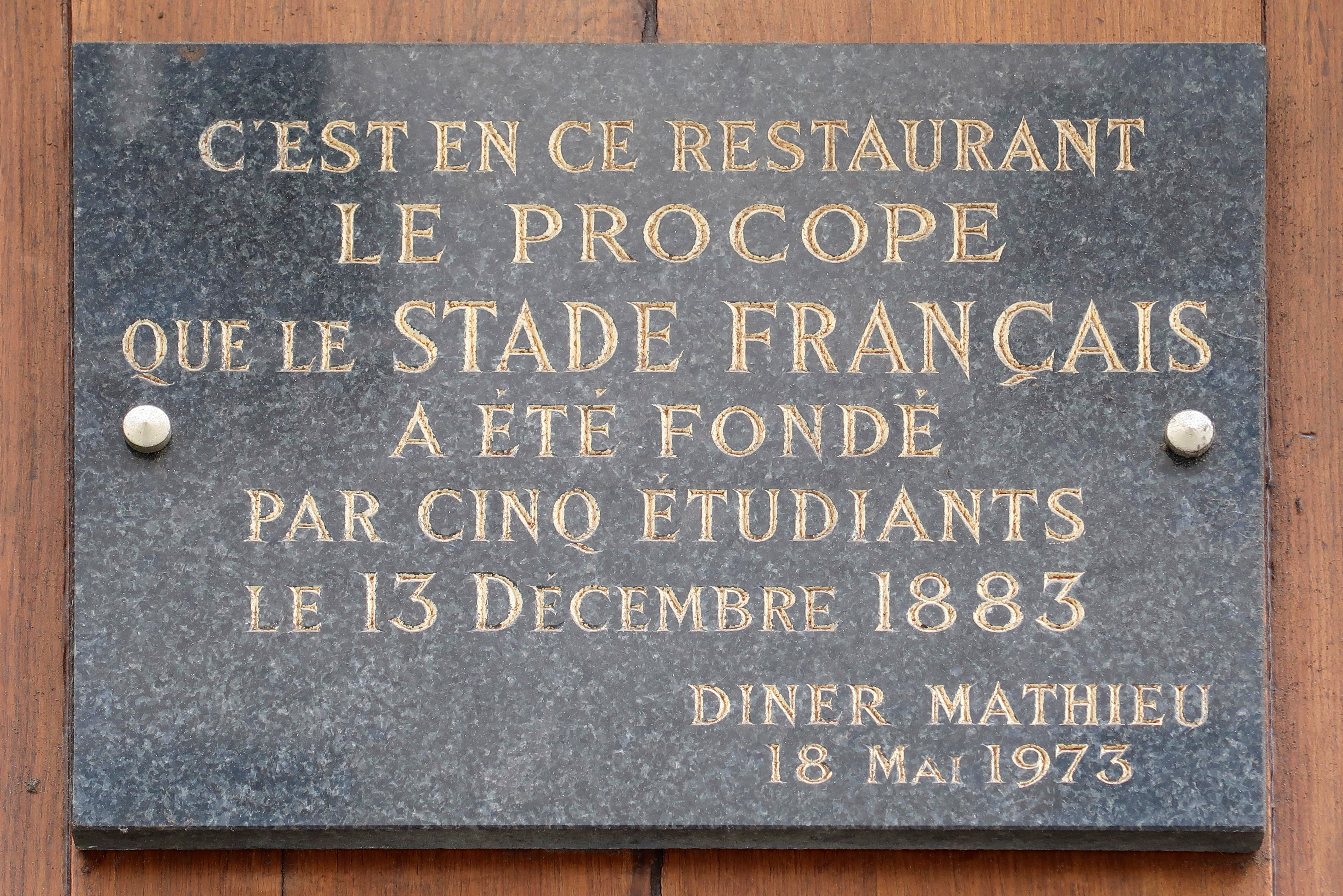 Plaque sur la façade du café Procope en hommage à la création du Stade français, 13 rue de l'Ancienne-Comédie (Paris, 6e).